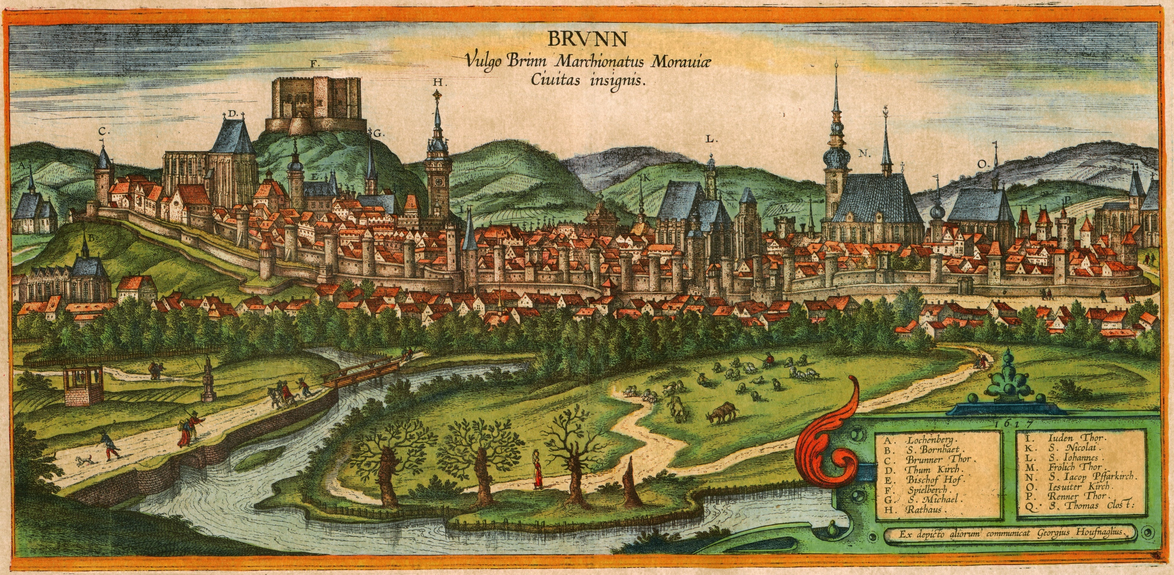 Veduta Brna na rytině Joris Hoefnagela z roku 1617.